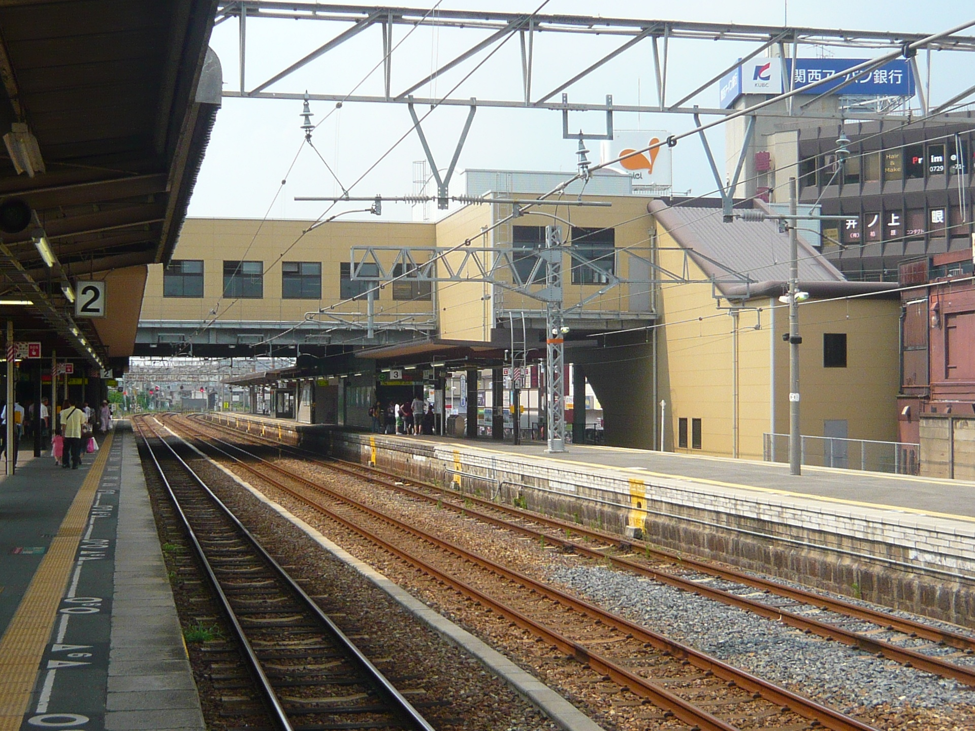 JR大和路線 柏原駅 Kashiwara station, JR Yamatoji line 2010.8.02